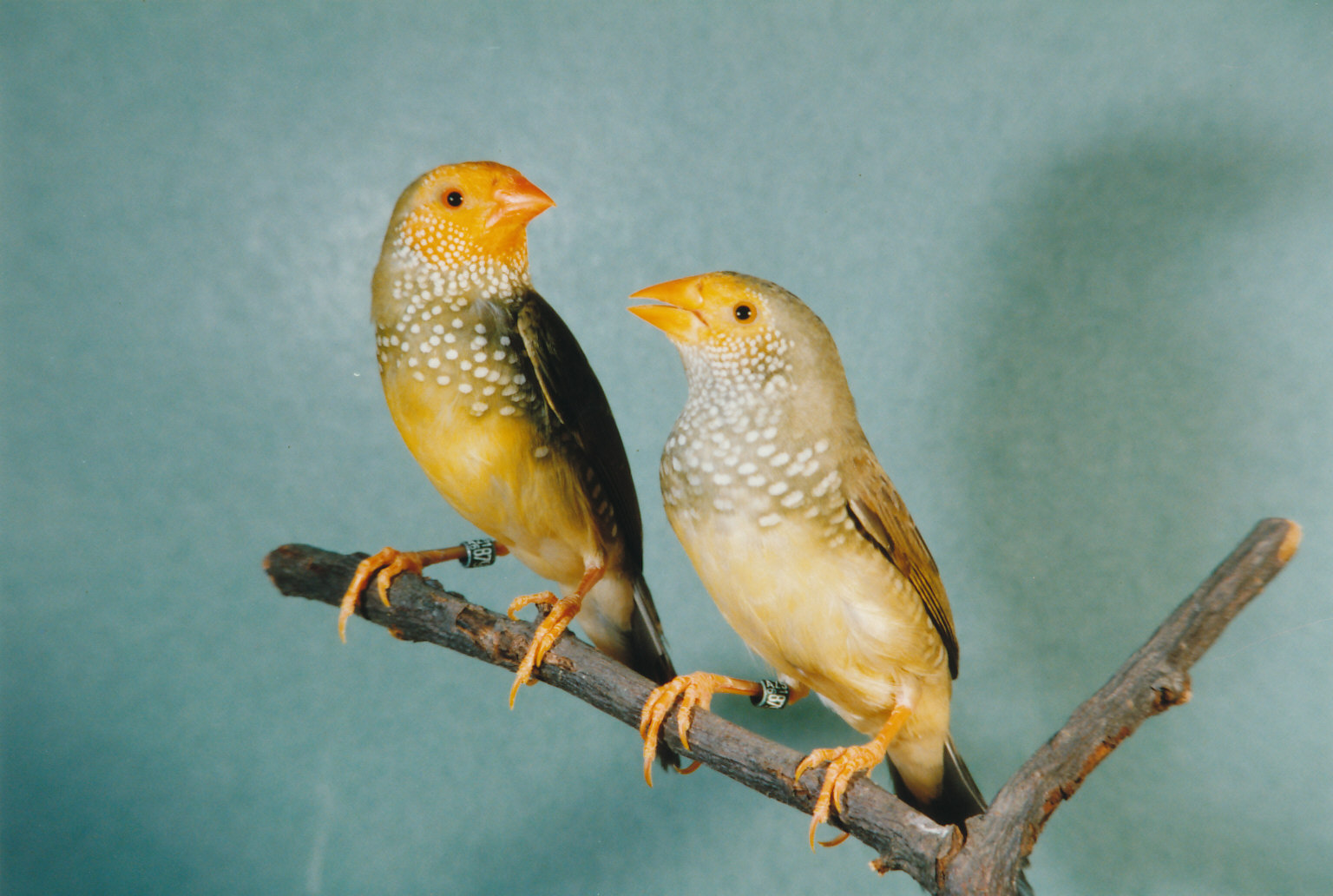 Binsenastrild Paar "Gelbköpfige Mutation"